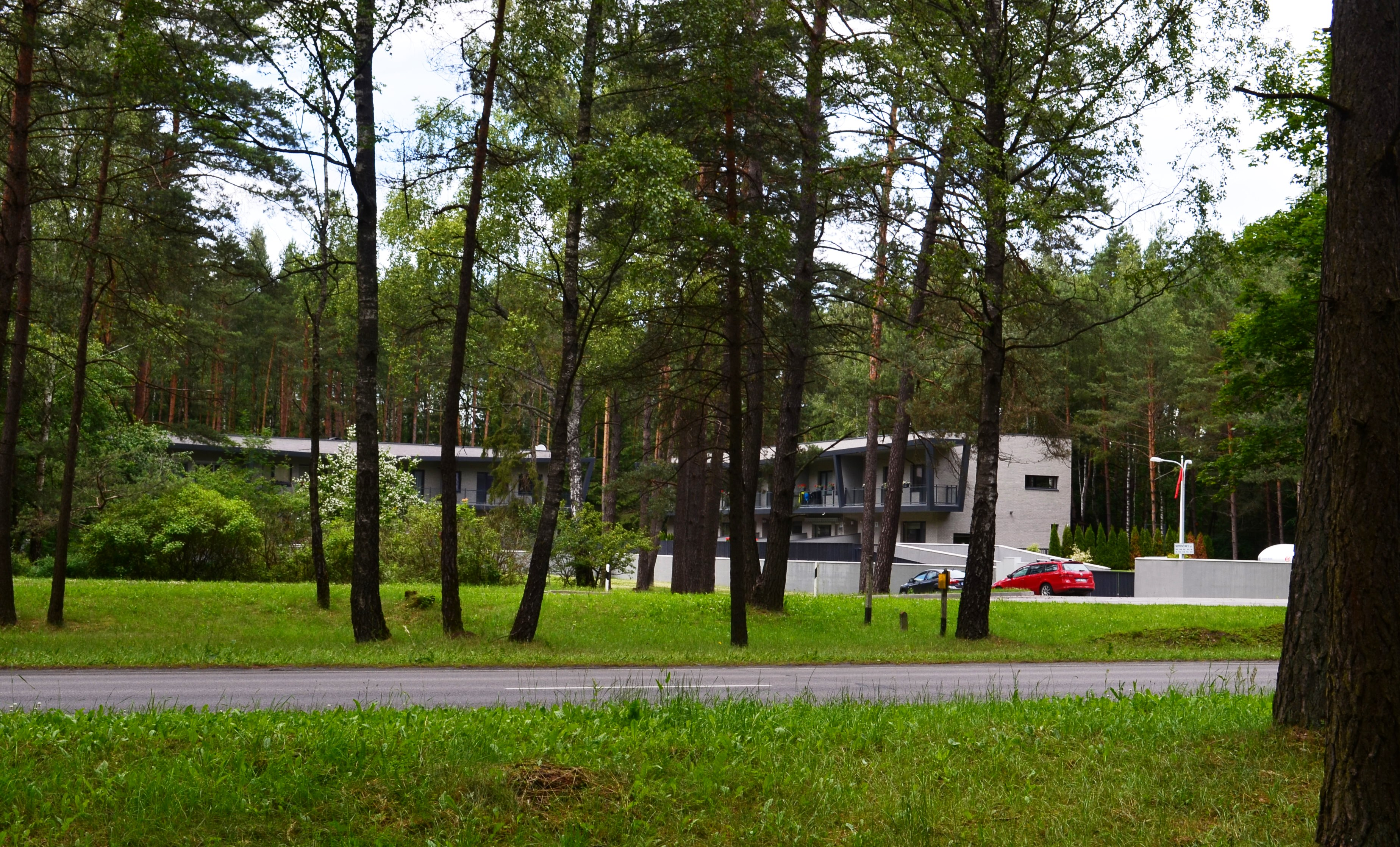 Nemenčinės plentas, Aukštagiris, Vilnius